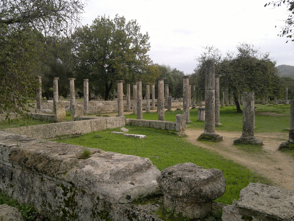 Ancient Olympia, Greece. Photo taken with Nokia N8 (12 Megapixel). Αρχαία Ολυμπία. Φωτογραφία που τράβηξα με το Nokia N8.